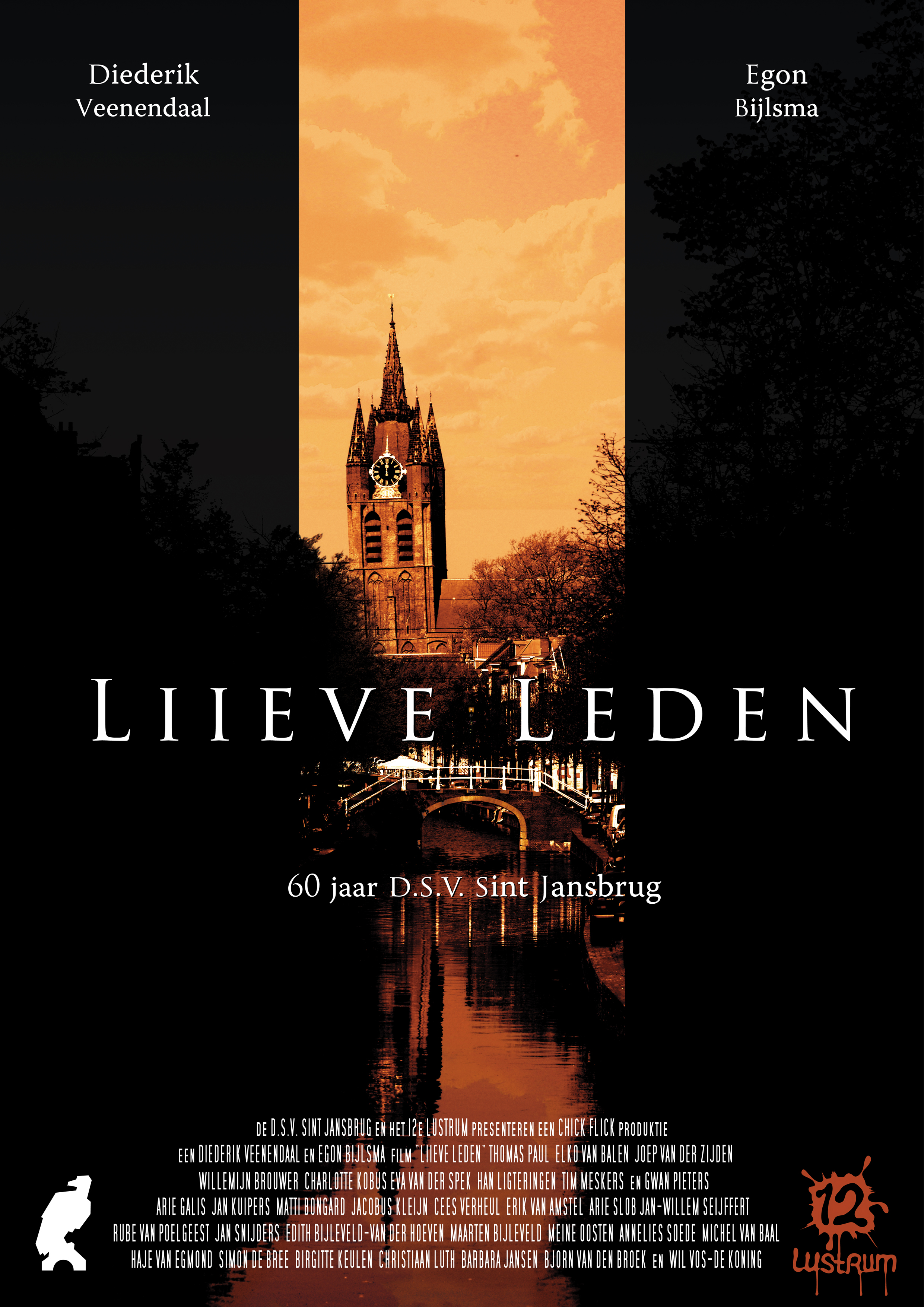 Filmposter 'Liieve Leden', een 2007 documentaire over de verenigingsgeschiedenis van Delftse Studenten Vereniging Sint Jansbrug.